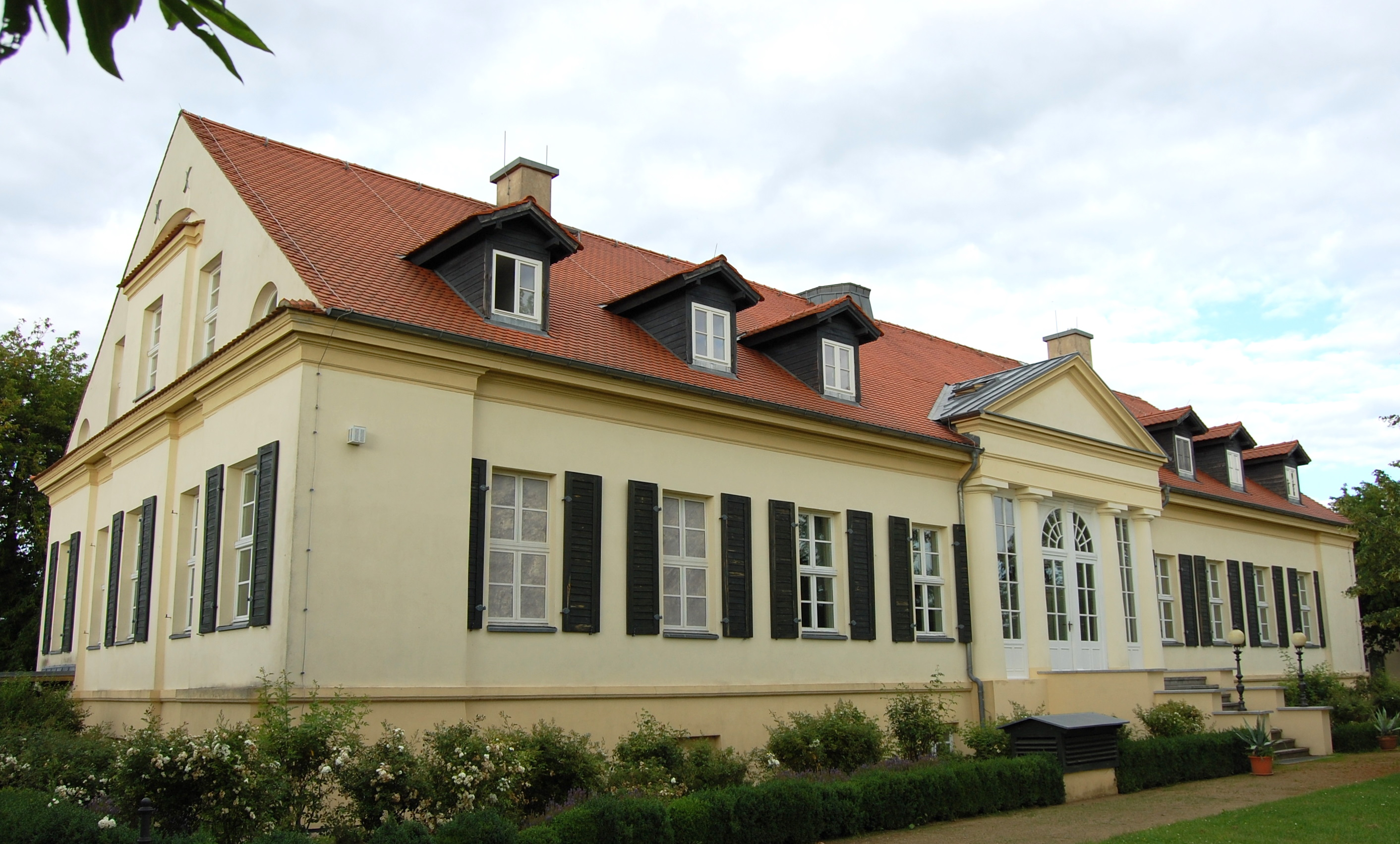 Schloss Neuhaus bei Lübben, Rückseite